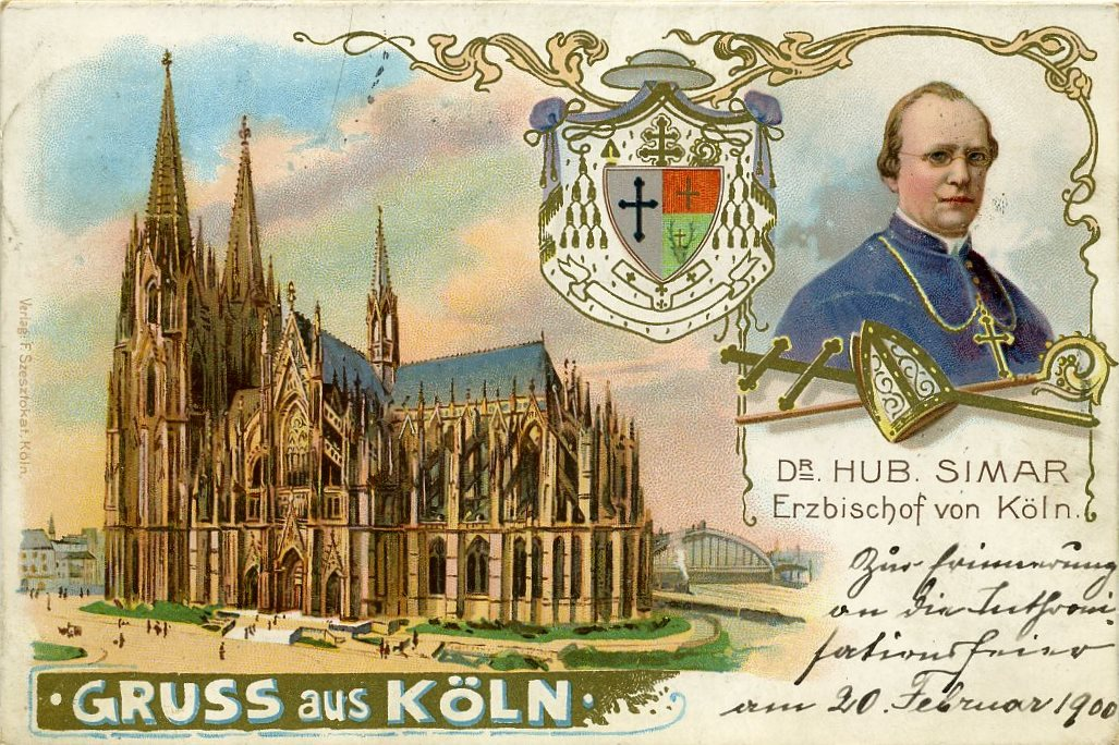 Gruss aus Köln - Hub. Simar -Erzbischof von Koln